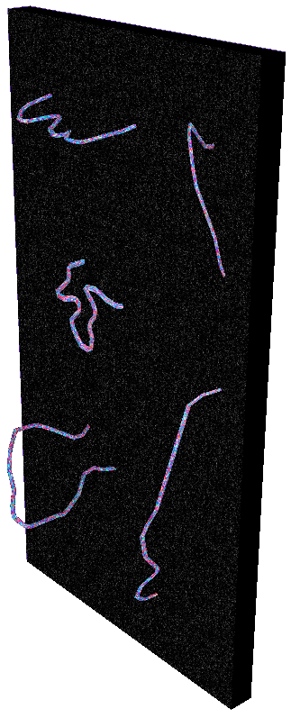 Une D-3-brane munie de 5 cordes.